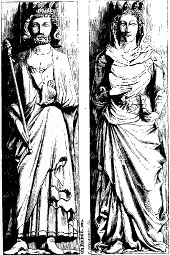 Gisants de Robert II de France et Constance d'Arles